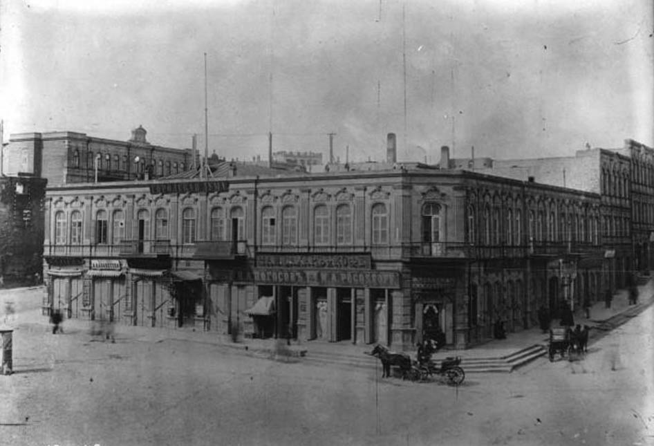 Aşumovun evi, Bakı, XIX əsrin ortaları (sonradan Duma binası)